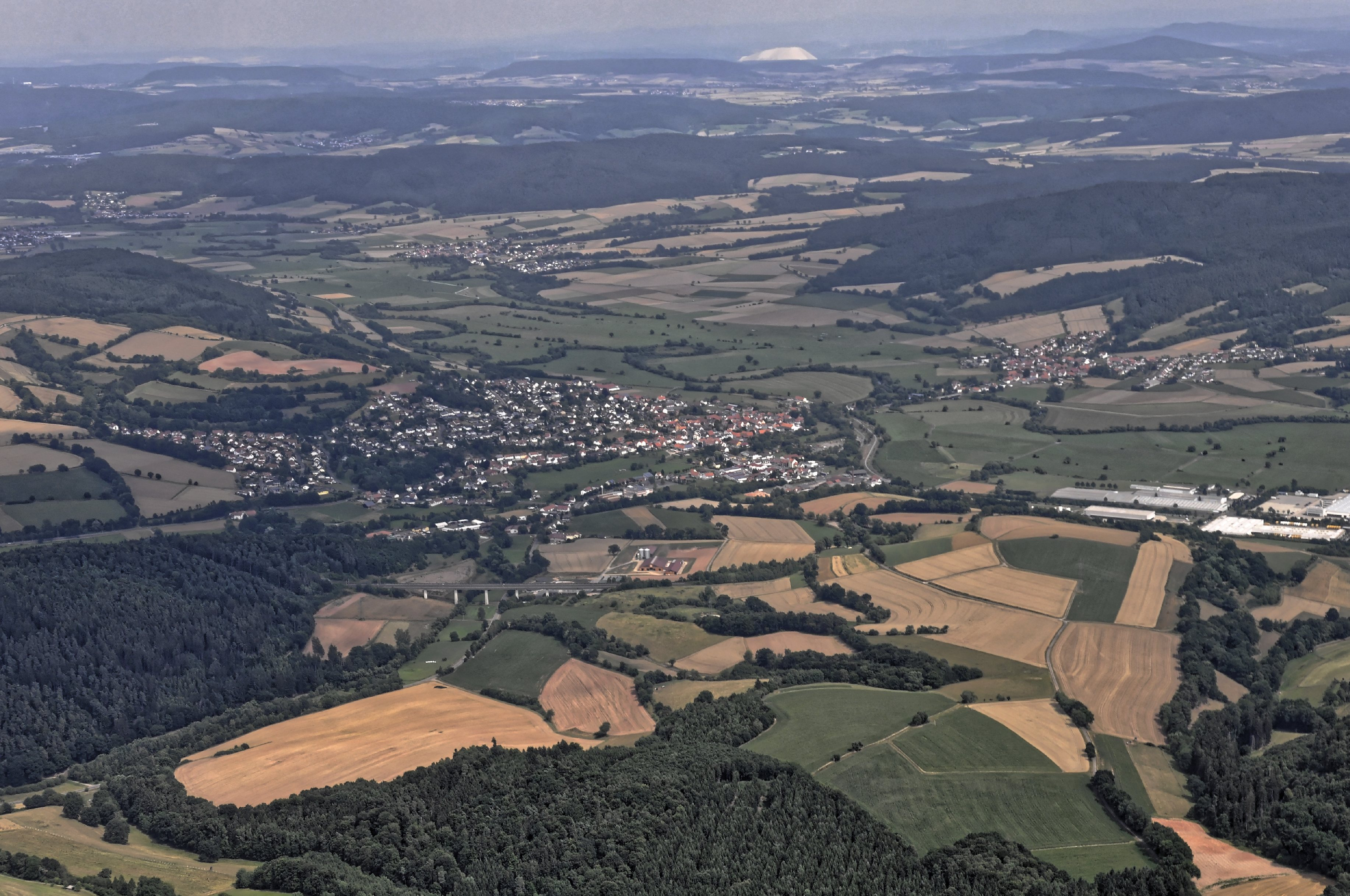 Bilder vom Flug Nordholz-Hammelburg 2015: Niederaula. Davor die Hattenbach-Talbrücke der ICE-Schnellfahrstrecke Hannover–Würzburg. Fast am Horizont der weiße “Monte Kali”, die Kaliabraumhalde bei Heringen an der Werra.